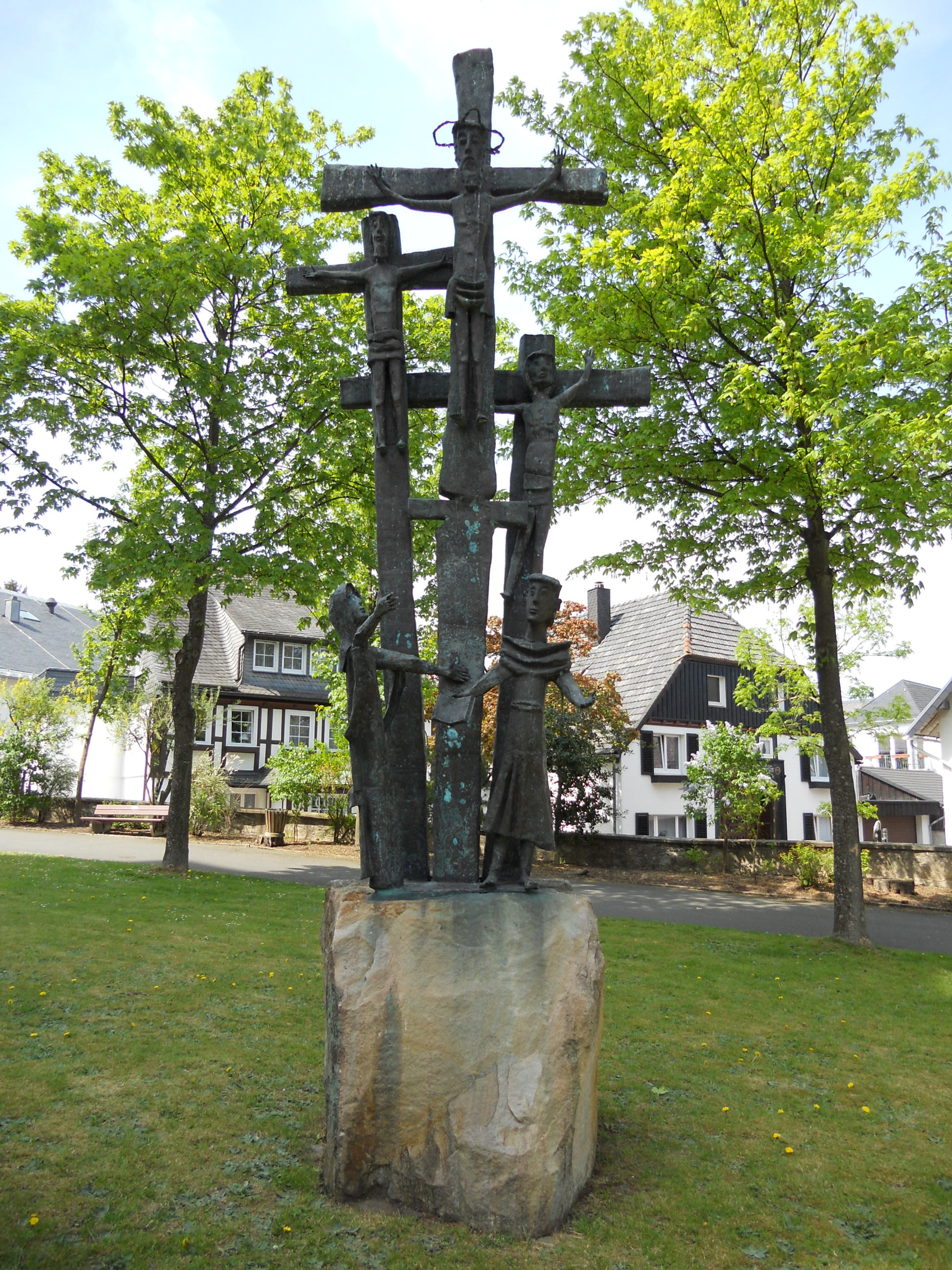 Brilon Propsteikirche Kreuzigungsdarstellung